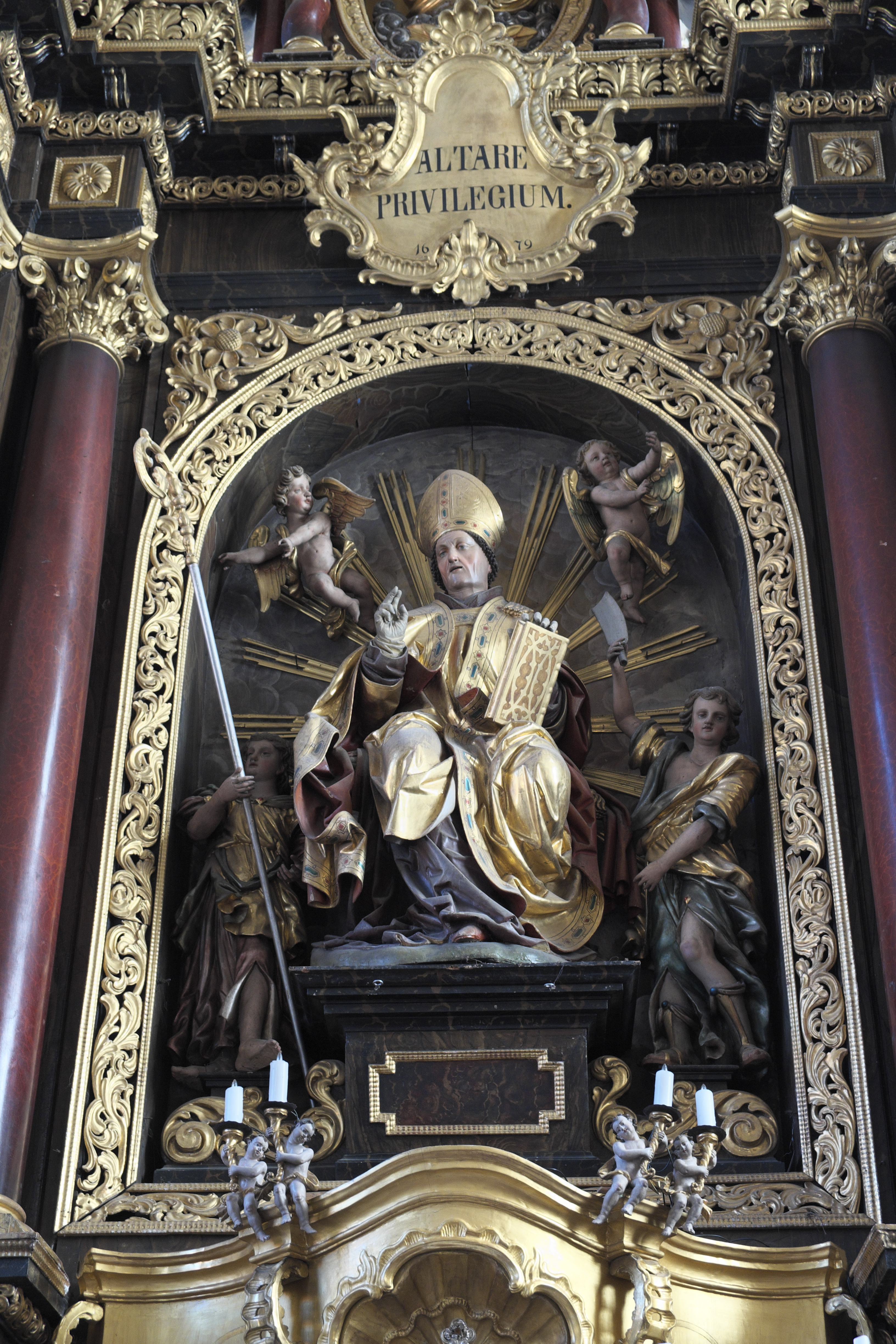 Katholische Pfarrkirche St. Emmeram in Kleinhelfendorf (Aying) im Landkreis München (Bayern/Deutschland), Hauptaltar